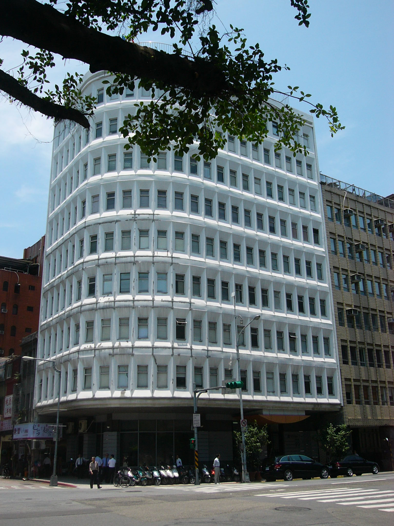 中文（台灣）: 亞洲水泥大樓，為遠東百貨總管理處，地址：臺北市中正區寶慶路27號。